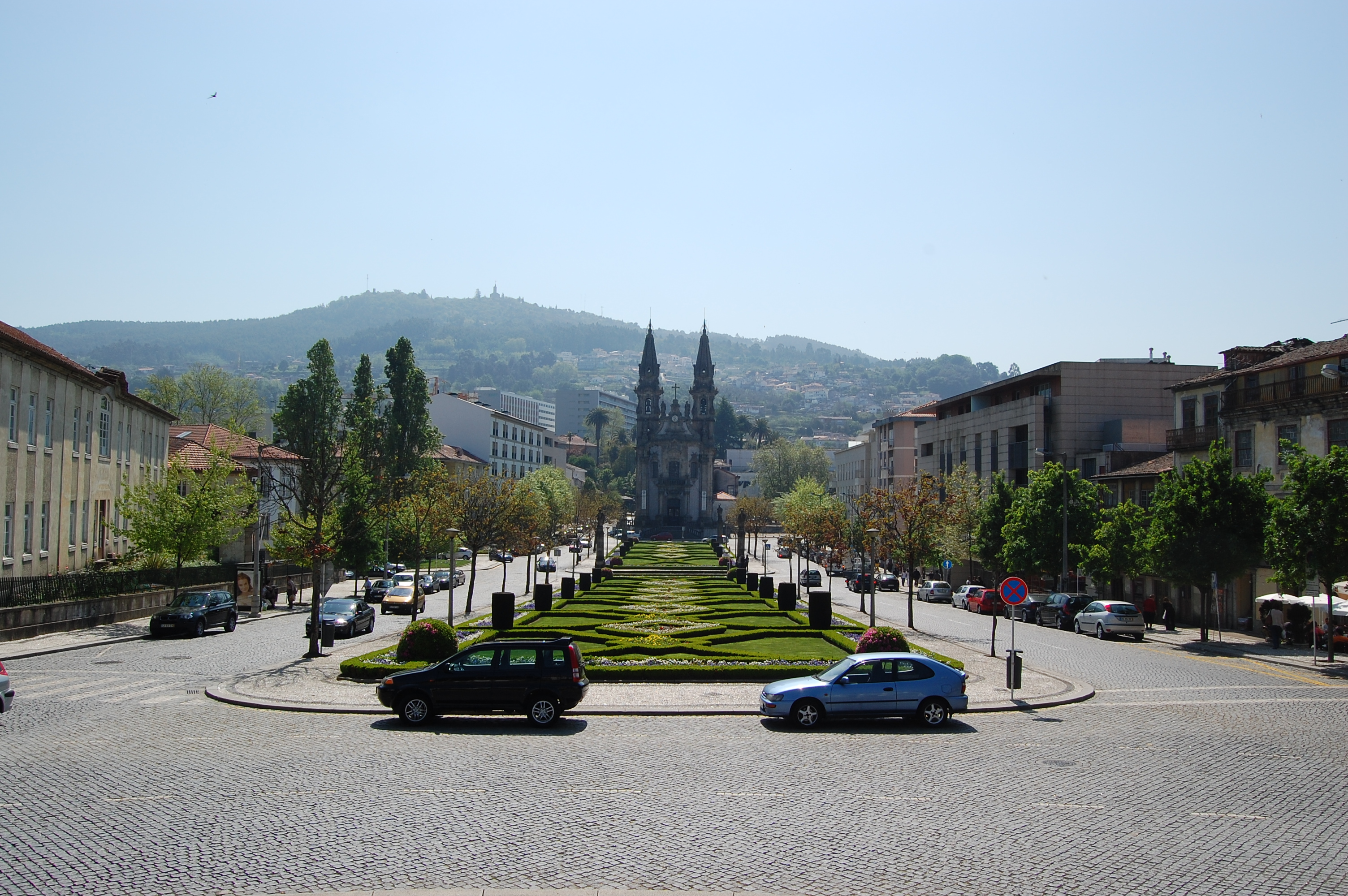 A cidade de Guimarães (distrito de Braga, noroeste de Portugal.